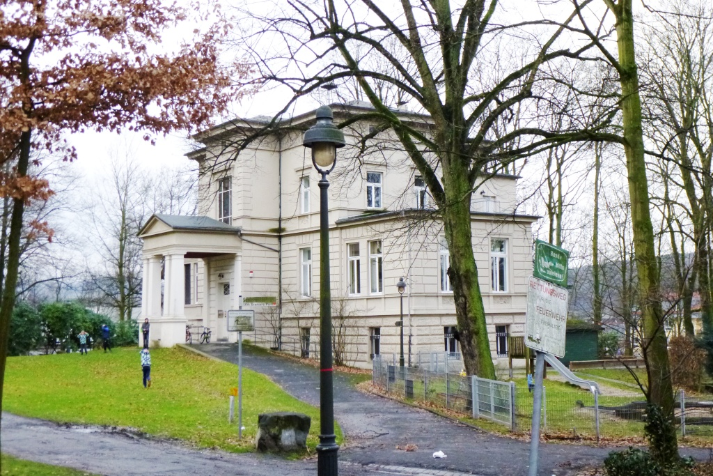 Villa Bremer in Arnsberg-Neheim